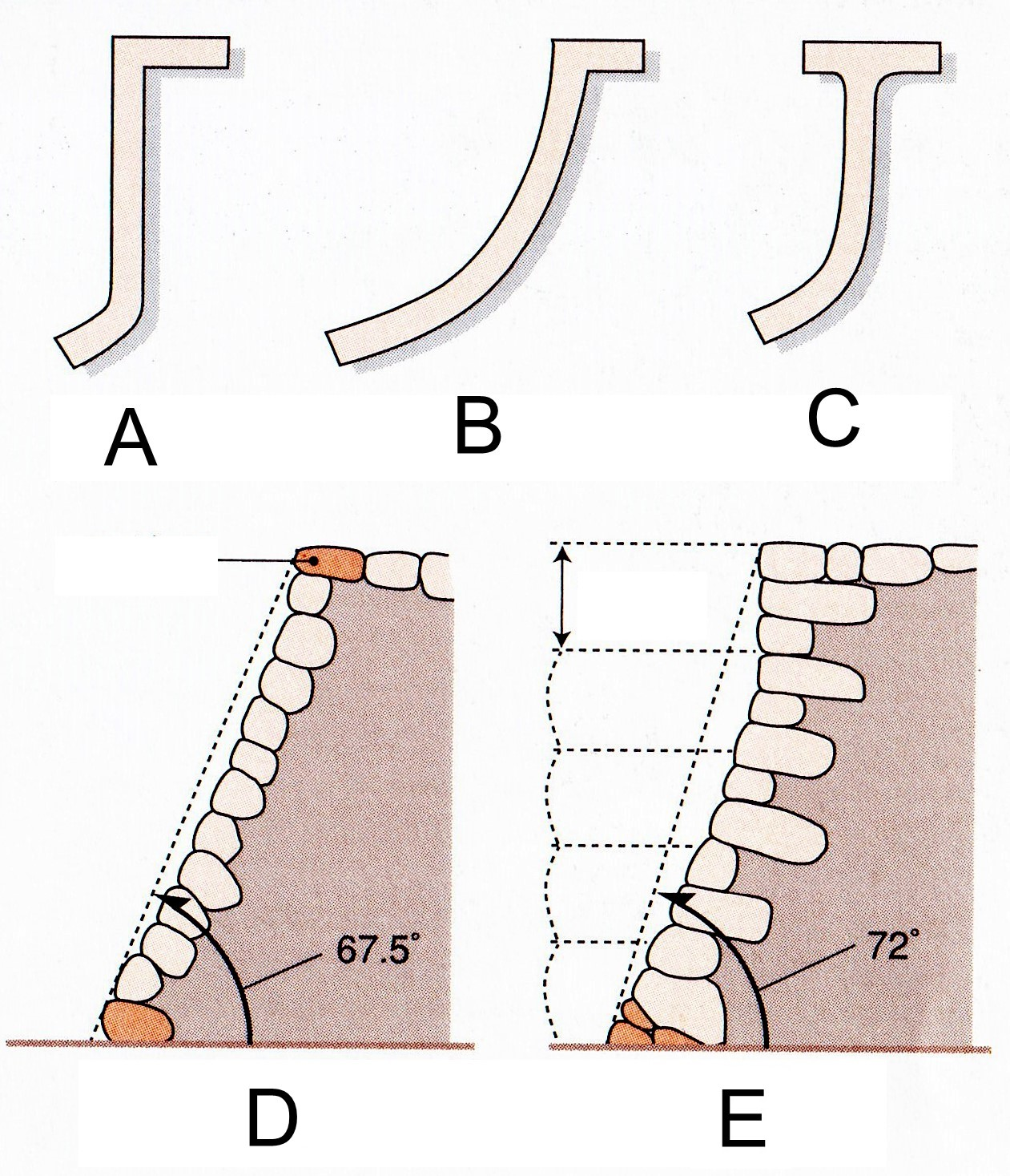 Castle stonewall types Japan